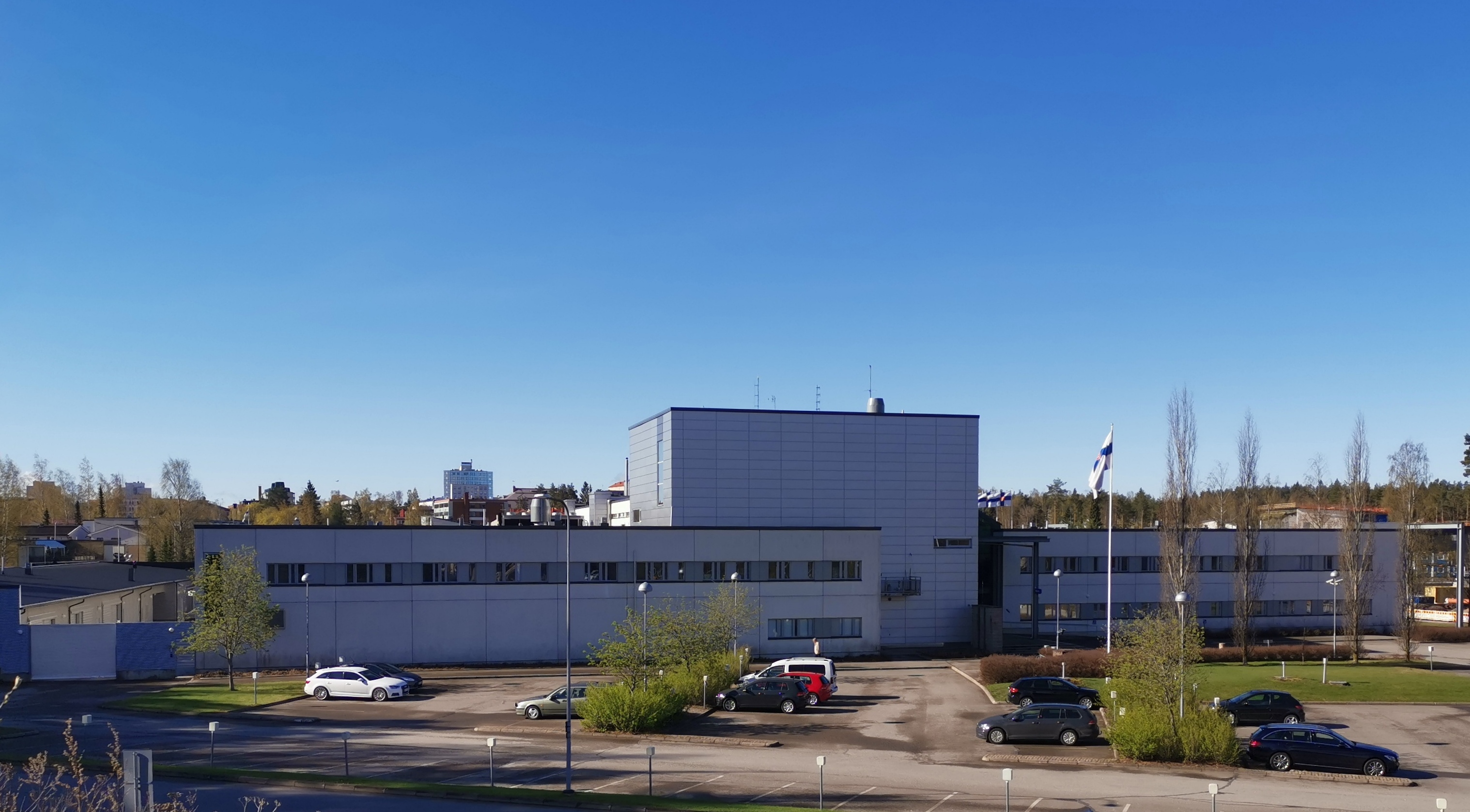 kouvola